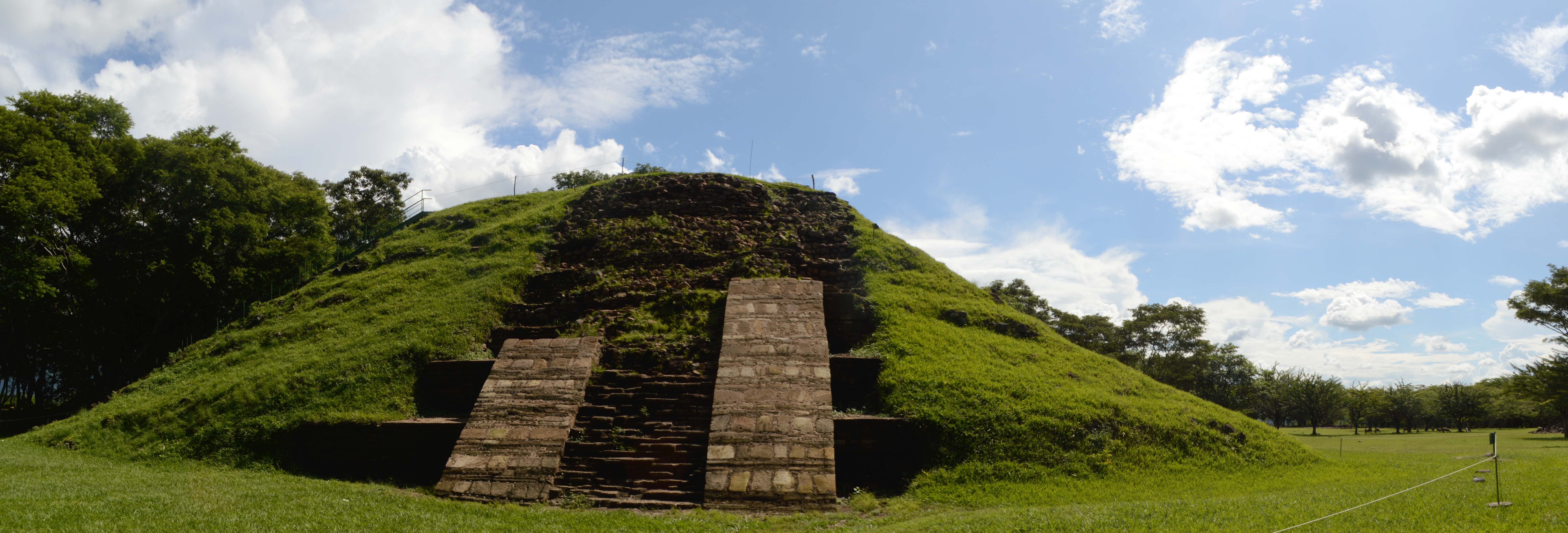 Piramide Cihuatan, Aguilares San Salvador El Salvador.